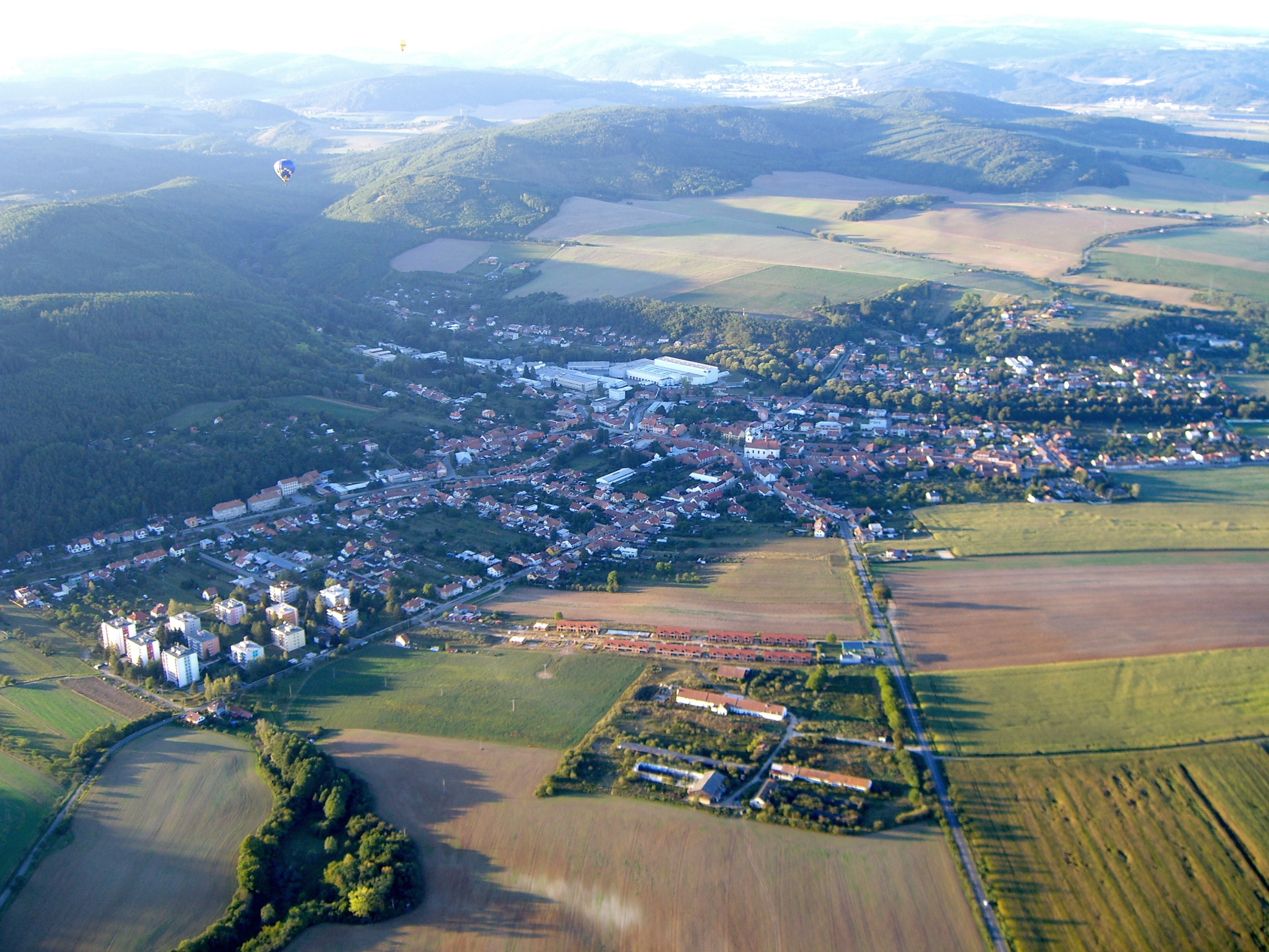 Veverská Bítýška, pohled z horkovzdušného balónu.